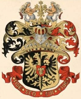 Korffi suguvõsa krahvivapp